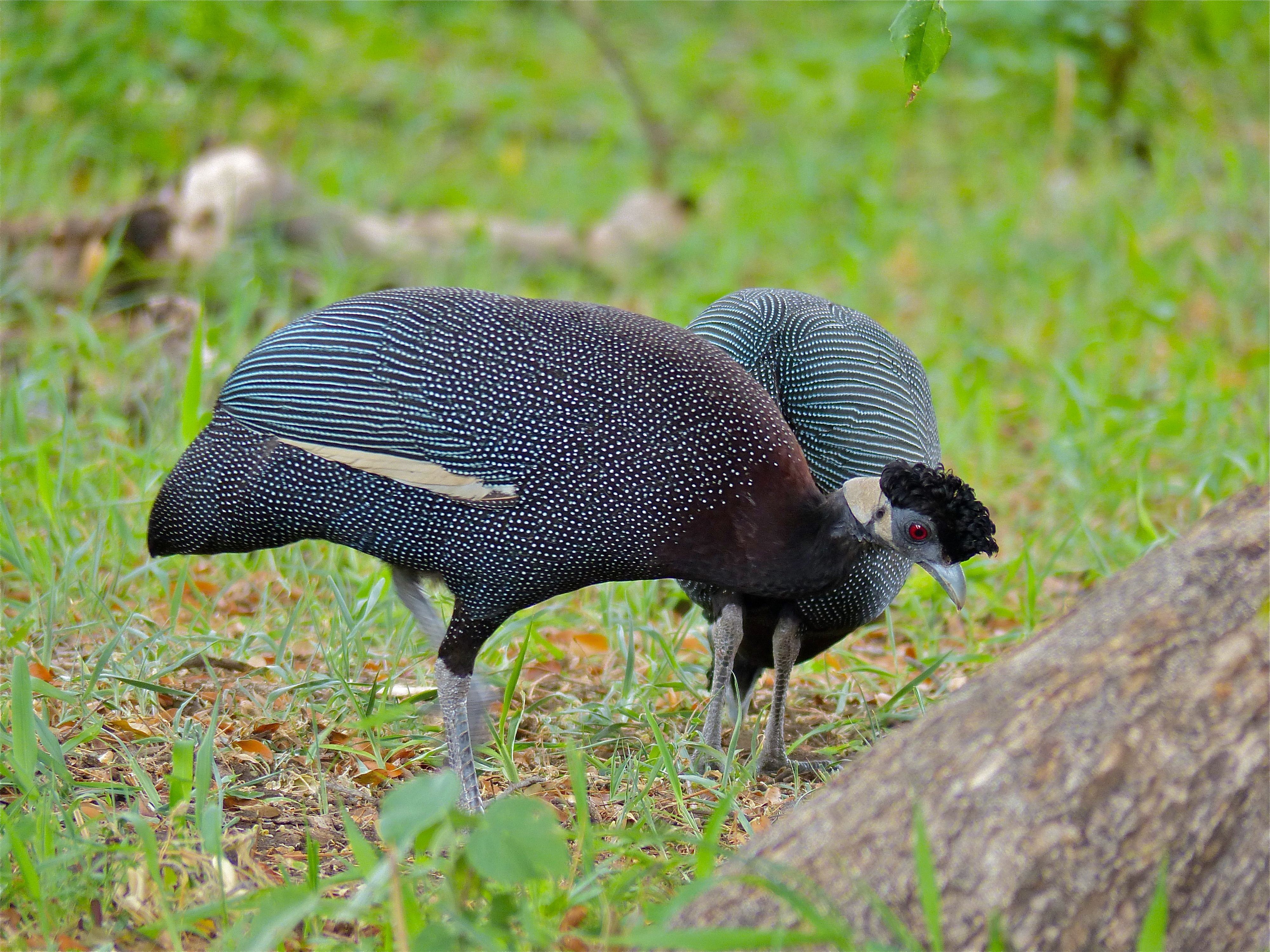 S64 Road, Pafuri area, Kruger NP, SOUTH AFRICA